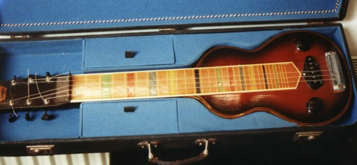 "Roger" Lap Steel Gitarre, deutsches Fabrikat, 50er Jahre, (Tonabnehmer erneuert). eigenes Foto